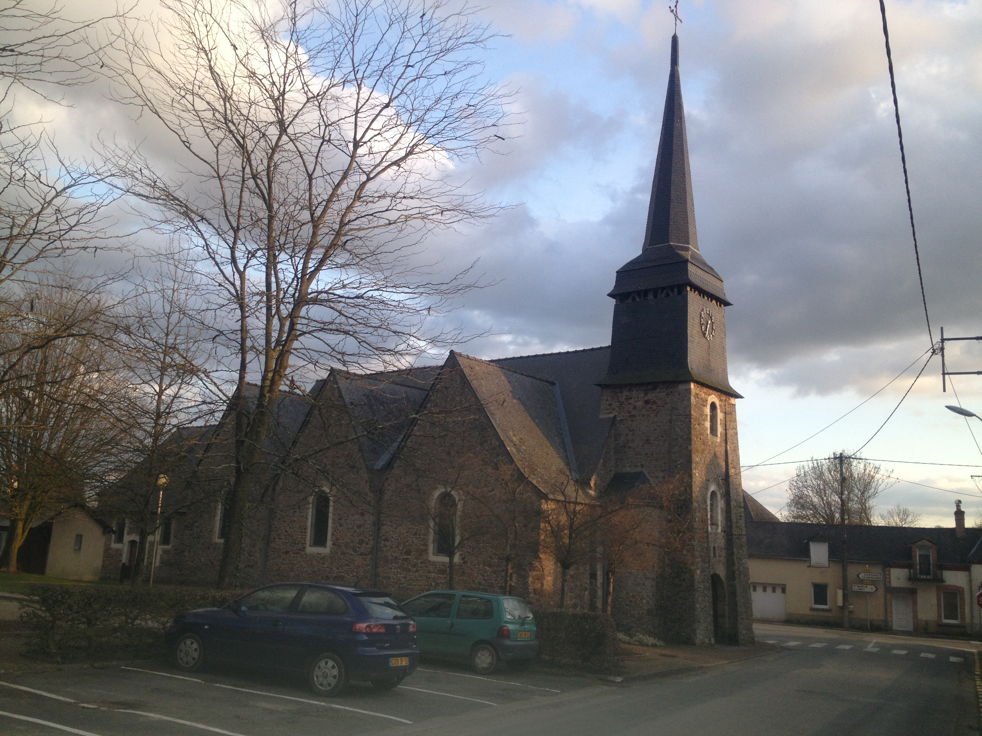 Mayenne, France